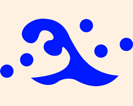 斎藤道三が用いた 家紋「二頭波」